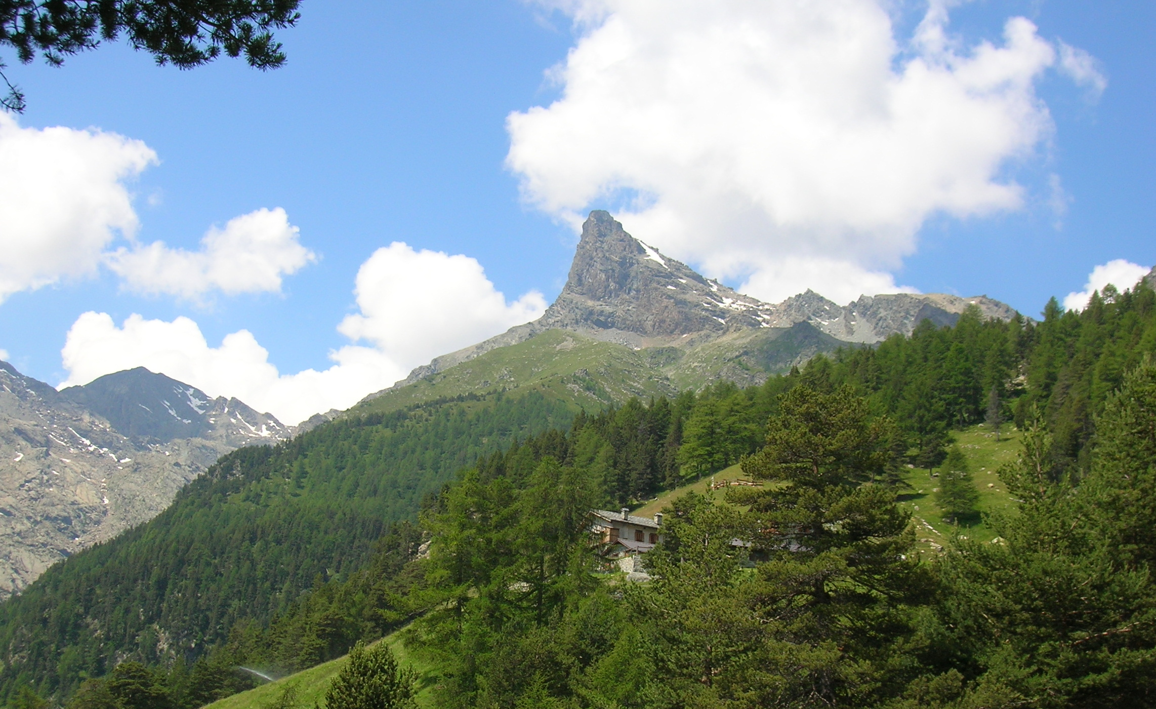 Panorama sul Mont Avic nei pressi dell'alpeggio degli inglesi (Praz Orsie), nel Parco Naturale Mont Avic. Comune di Champdepraz, Valle d'Aosta, Italia.